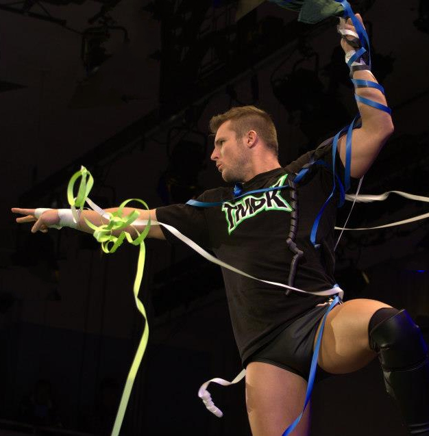 入場するシェイン・ヘイスト